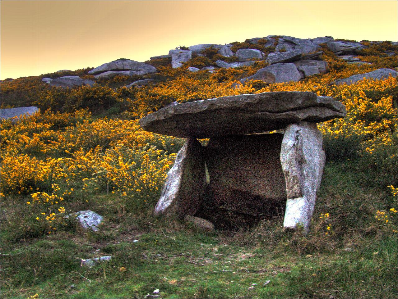 Dolmen da Fornela dos Mouros, en Aprazadoiro, Nande, Laxe, Galiza